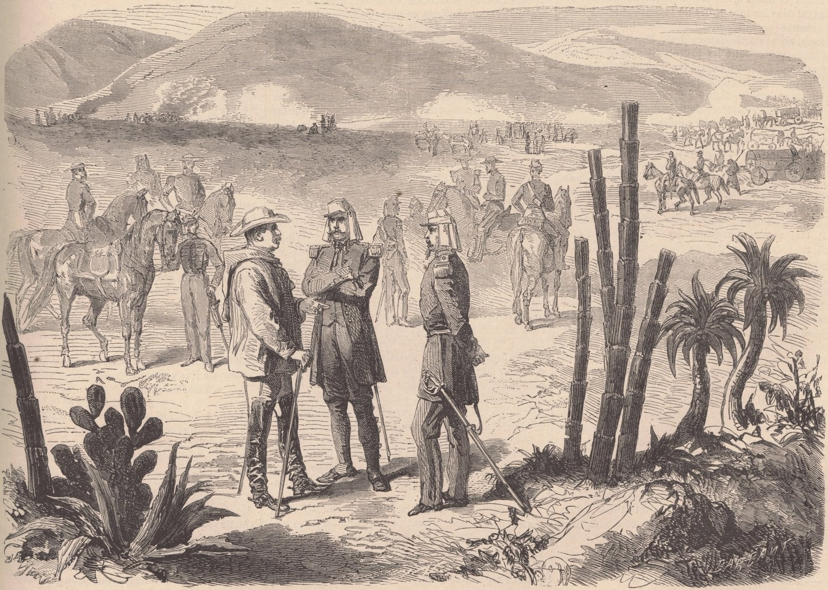 Expédition du Mexique. — Marche sur Puebla. Le général Forey au bivouac de San Agostino del Palmar. (D'après un croquis de M. Brunnet, lieutenant d'artillerie.).